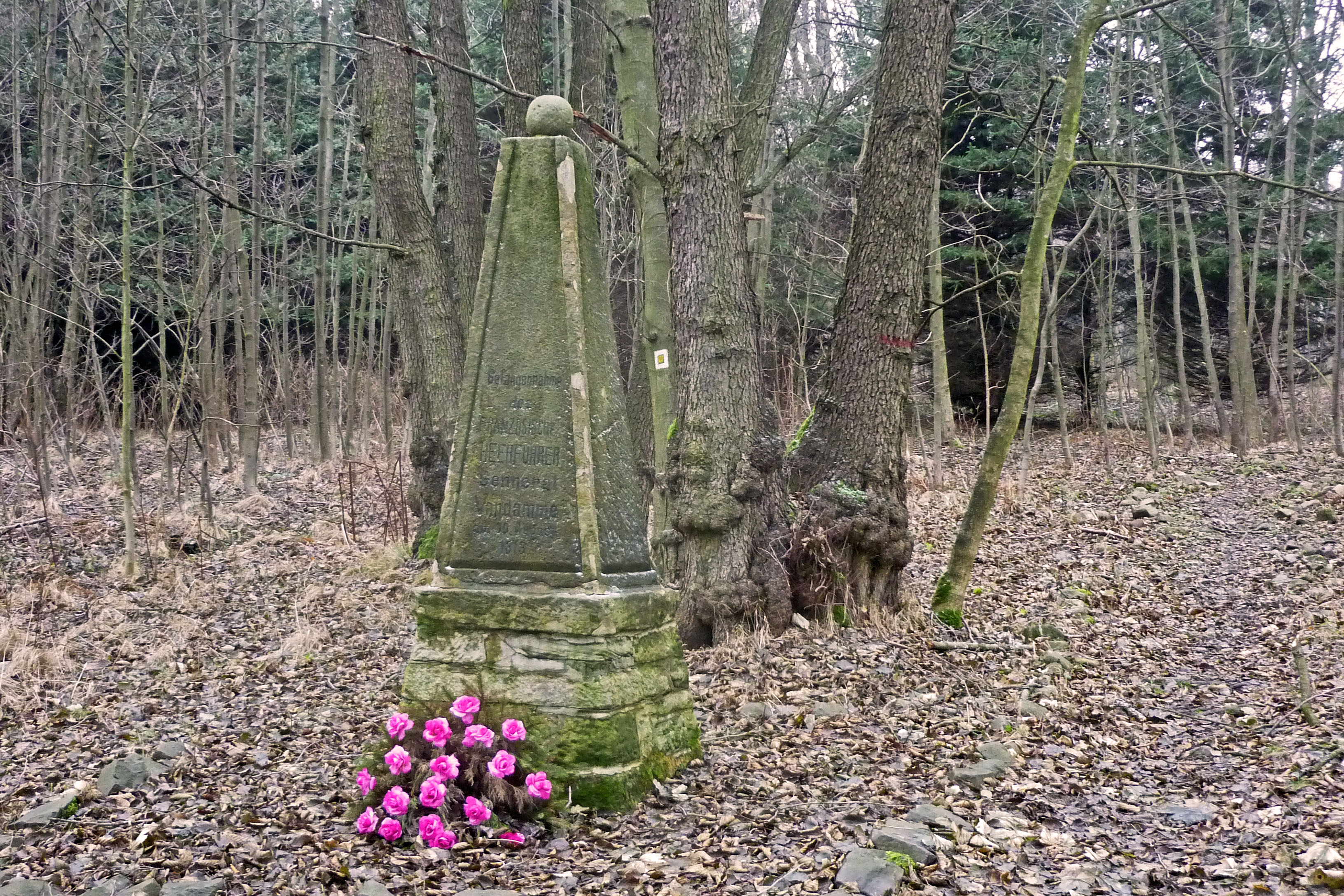 Denkmal zur Gefangennahme des Generals Vandamme bei der Schlacht von Kulm (1813) in Schanda (Žandov), OT von Chlumec